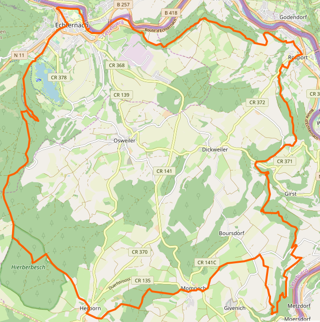 Streck vum Wanderpad Mëllerdall Trail Route 1